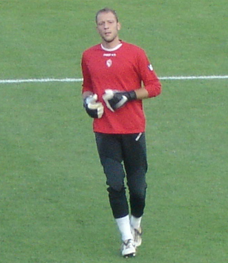 Federico Agliardi durante un prepartita del Rimini Calcio.